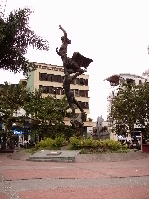 Monumento Al Esfuerzo